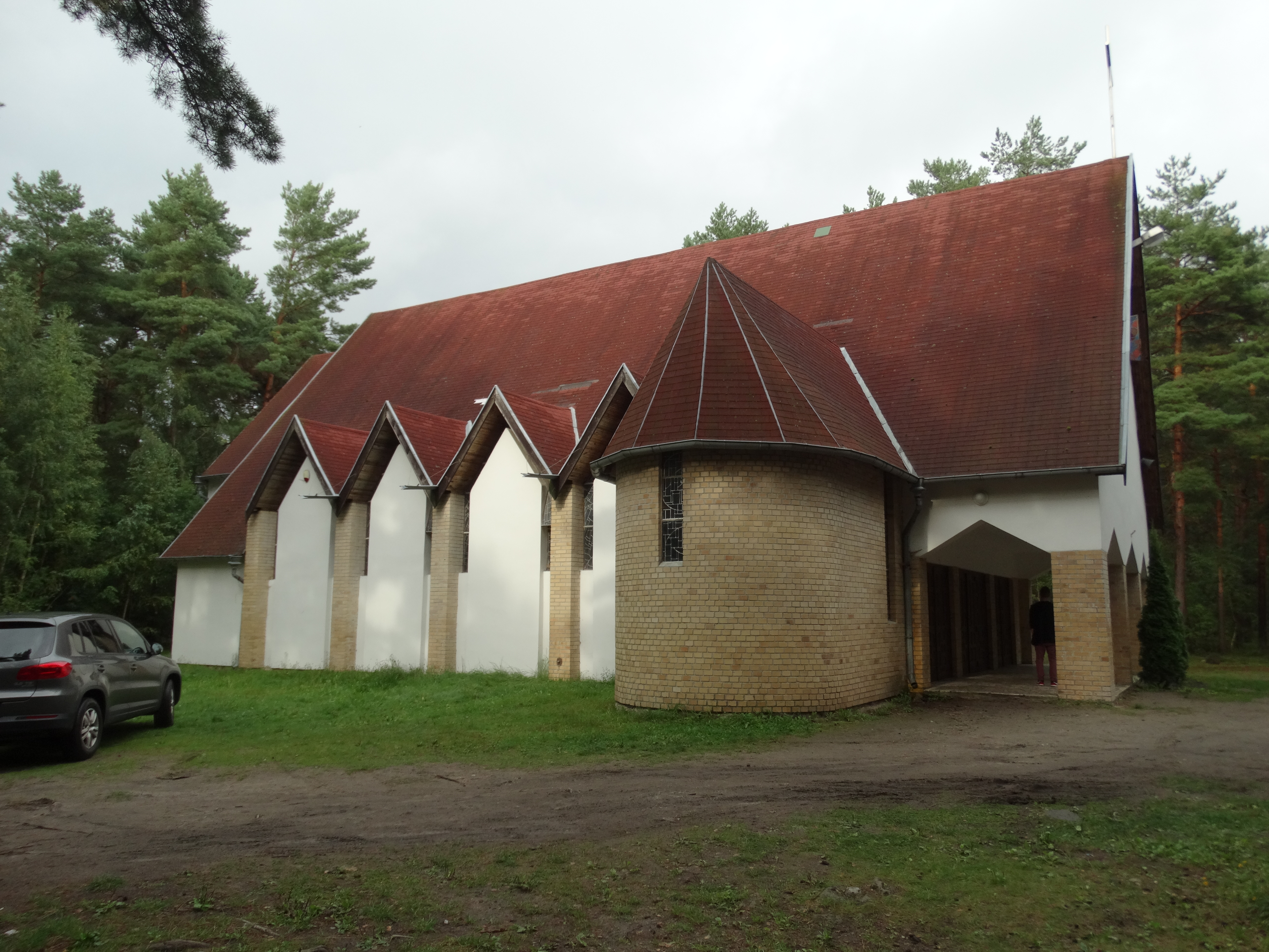 Pogorzelica, kościół filialny pw. Wniebowzięcia NMP